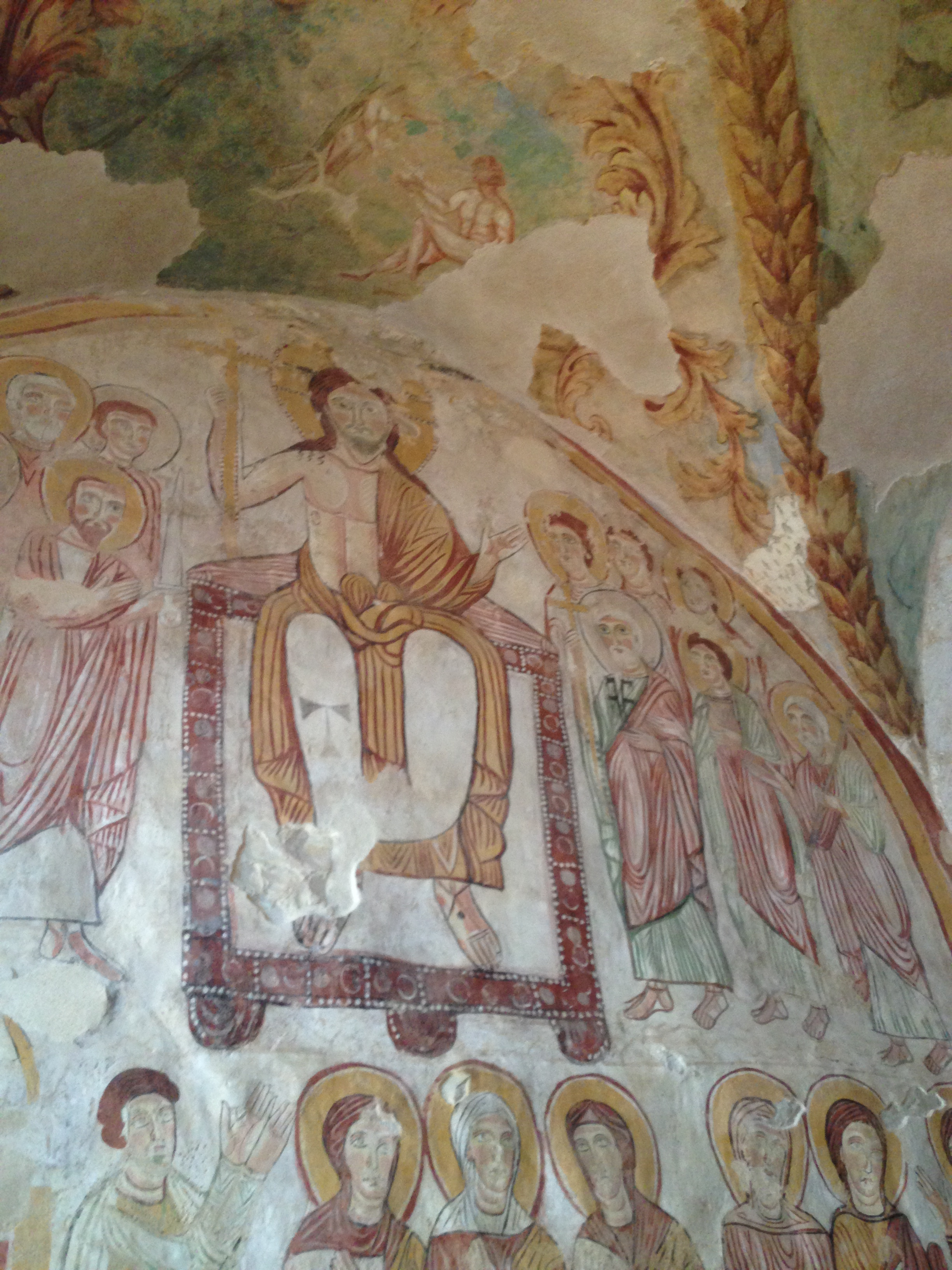 Eremo di San Cataldo. Cottanello. Particolare dell'affresco raffigurante sei santi e l'offerente, Gesù crucigero e benedicente seduto in seggio tra gli apostoli.